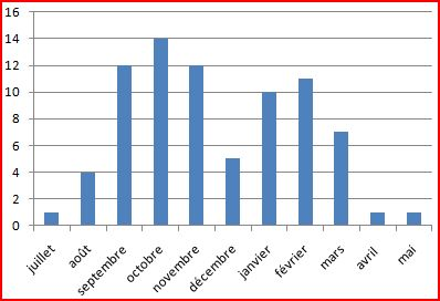 Histogramme de l'évolution de la mortalité à Querrieu, au cours de l'épidémie de peste des années 1739 et 1740.